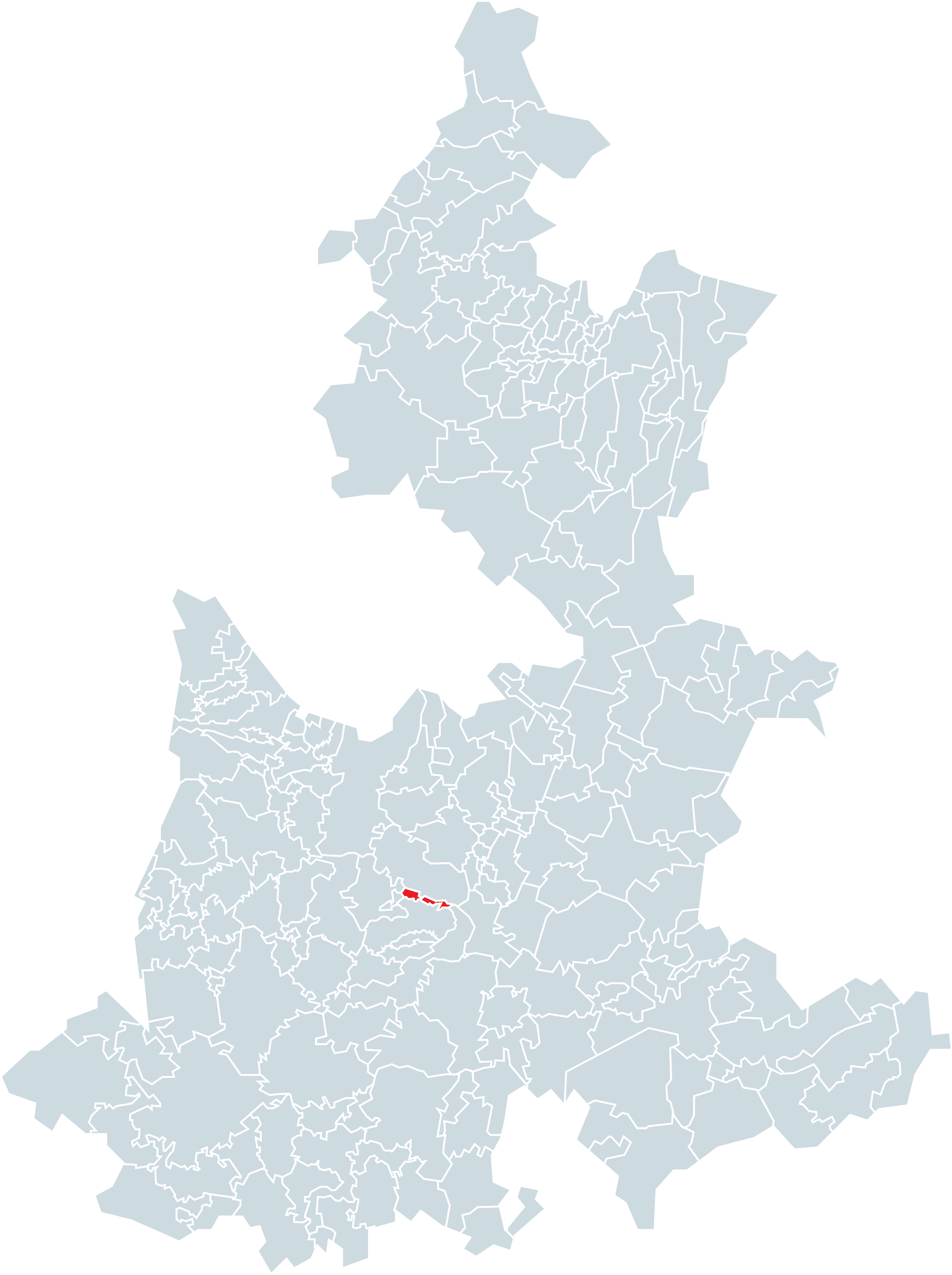 Municipio de San Juan Atzompa